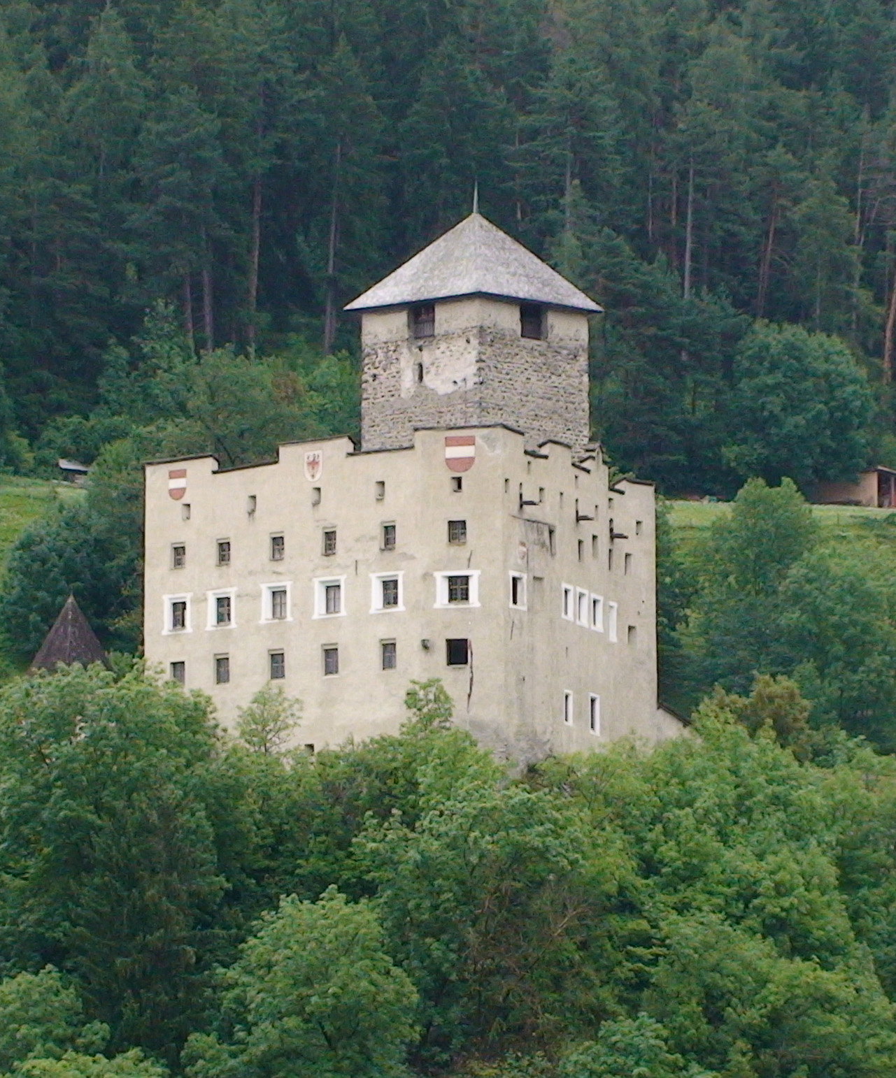 Burg Landeck / Bezirksmuseum